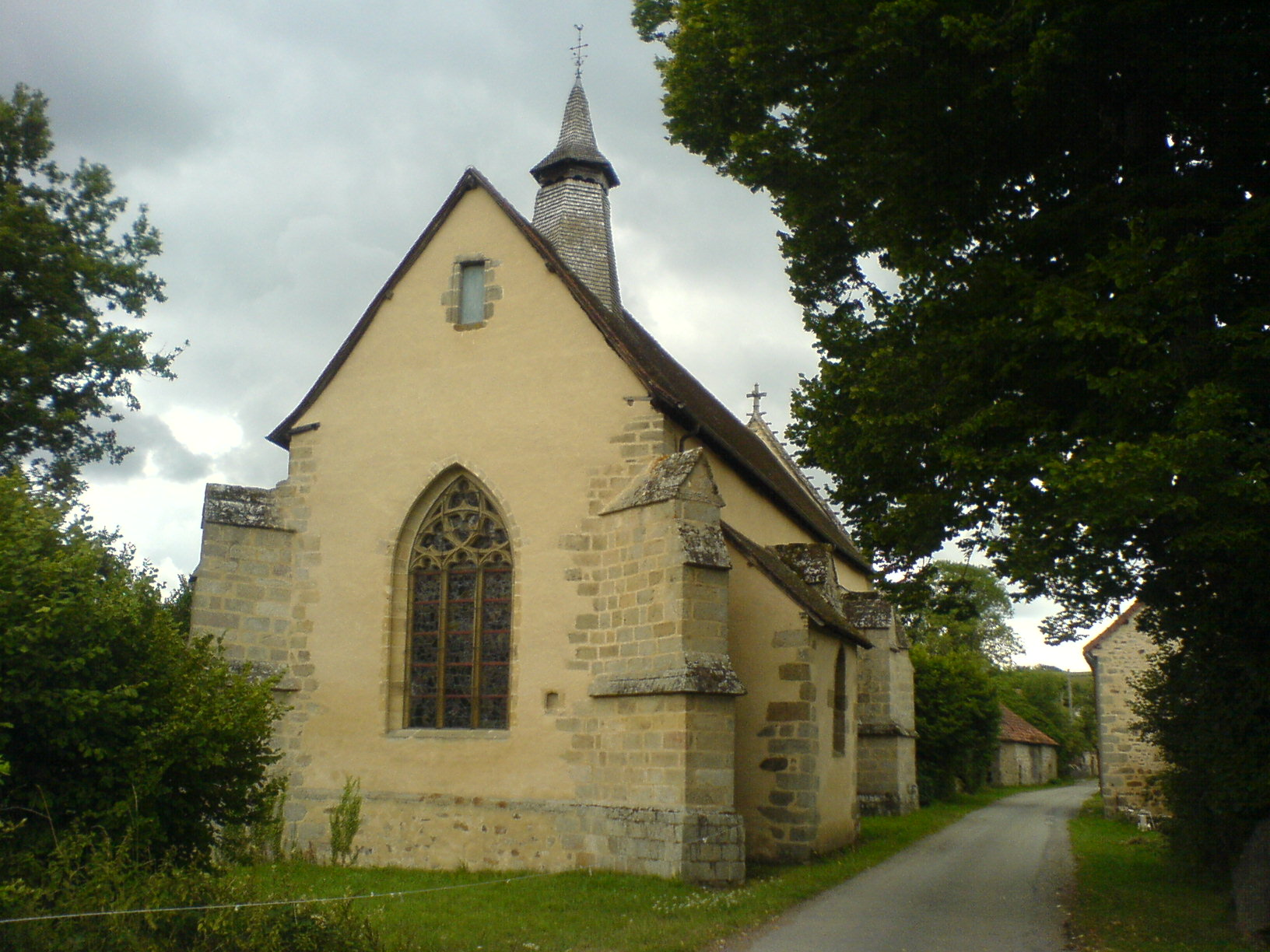 Chapelle